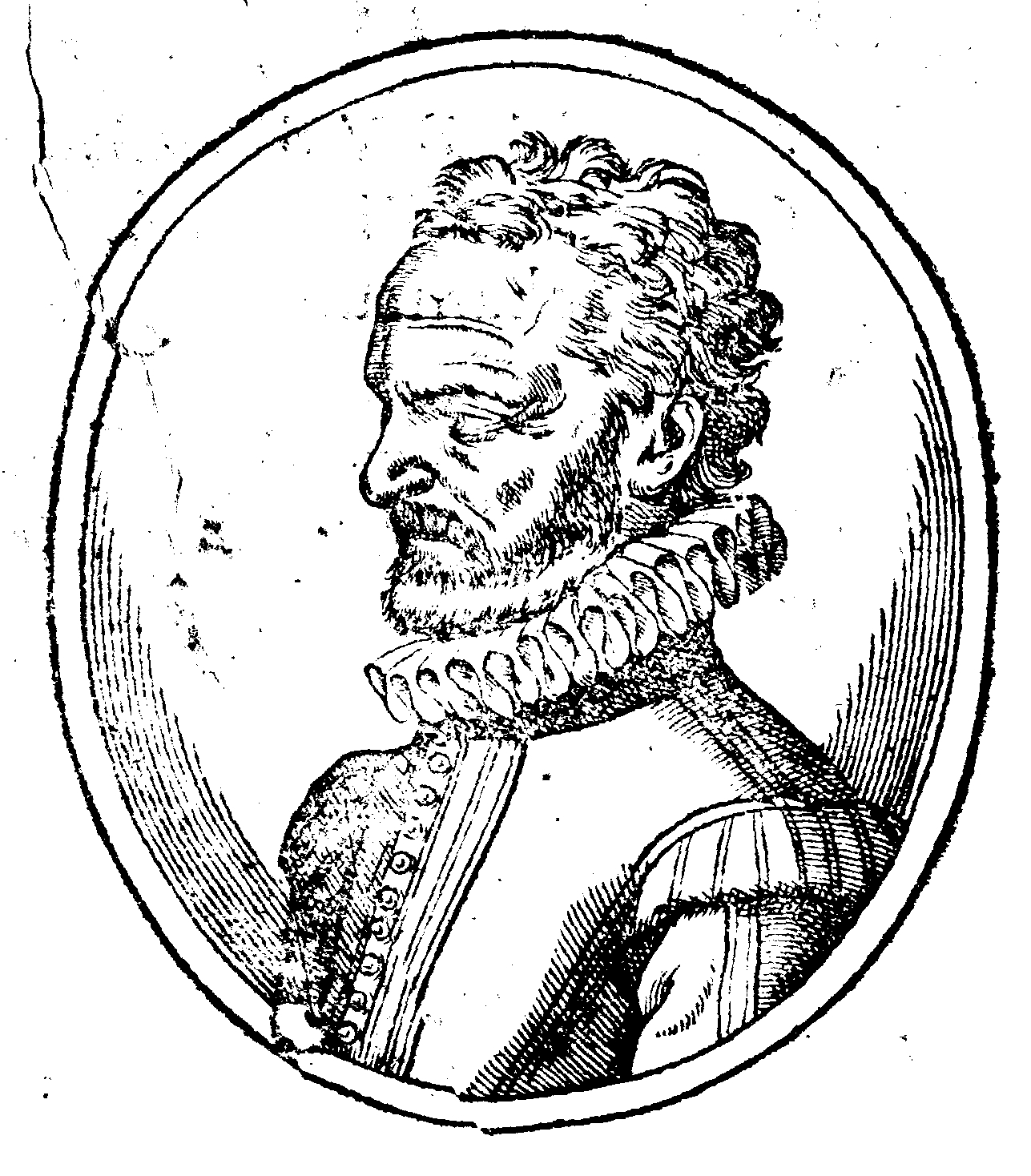 French economist Barthélemy de Laffemas (1545-1612?)